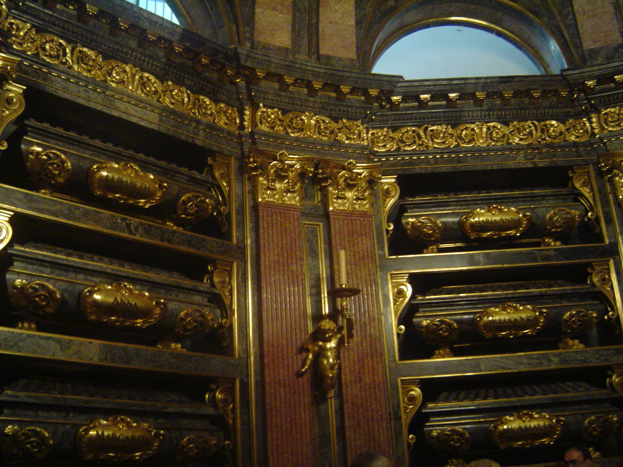 Sarcófagos con los restos mortales de algunas reinas consortes de España y madres de reyes en el Panteón de Reyes del monasterio de San Lorenzo de El Escorial, (España).